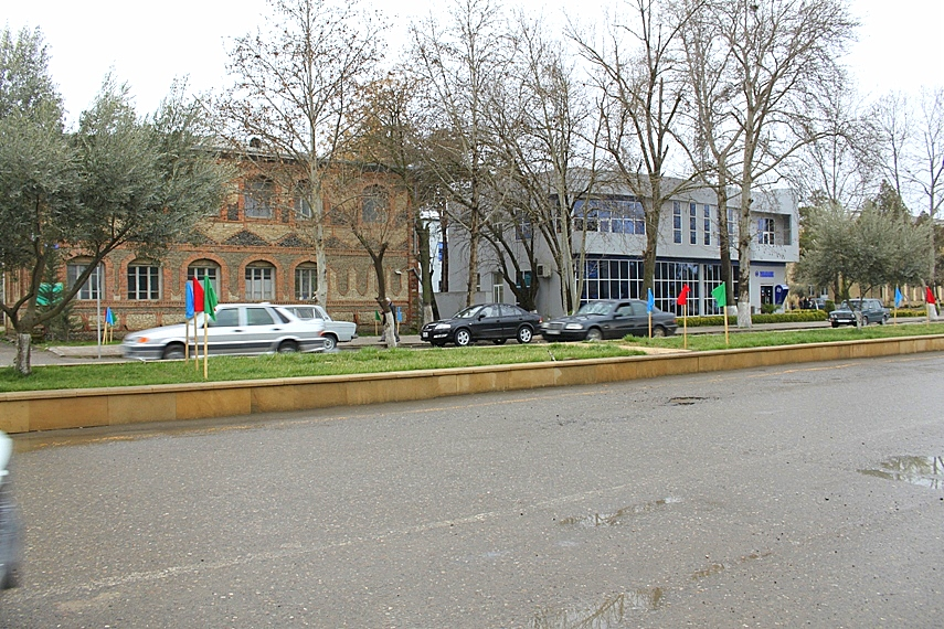 Город Бейлаган административный центр Бейлагансокго района Азербайджана.